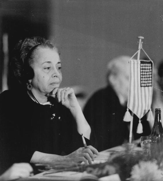 Zentralbild- We-Fr 23.11.1960 VII. Bundeskongress des DFD. 1. Tag - In der festlich geschmückten Berliner Dynamo-Sporthalle wurde am 23.11.1960 der VII. Bundeskongress des Demokratischen Frauenbundes Deutschlands eröffnet. An dieser Tagung der größten Frauenorganisation in der Geschichte Deutschlands nehmen weit über 1 400 Delegierte und Gäste teil. Die Bedeutung des Kongresses wird durch die Anwesenheit von Vertreterinnen der Internationalen Frauenbewegung aus 17 Ländern der Erde unterstrichen. Der dreitägige Kongress wird sich mit dem Beitrag der Frauen und Mütter im Kampf zur Sicherung des Friedens und zum Aufbau des Sozialismus in der DDR beschäftigen. UBz. Mrs. Petterson aus den USA während der Konferenz im Präsidium.